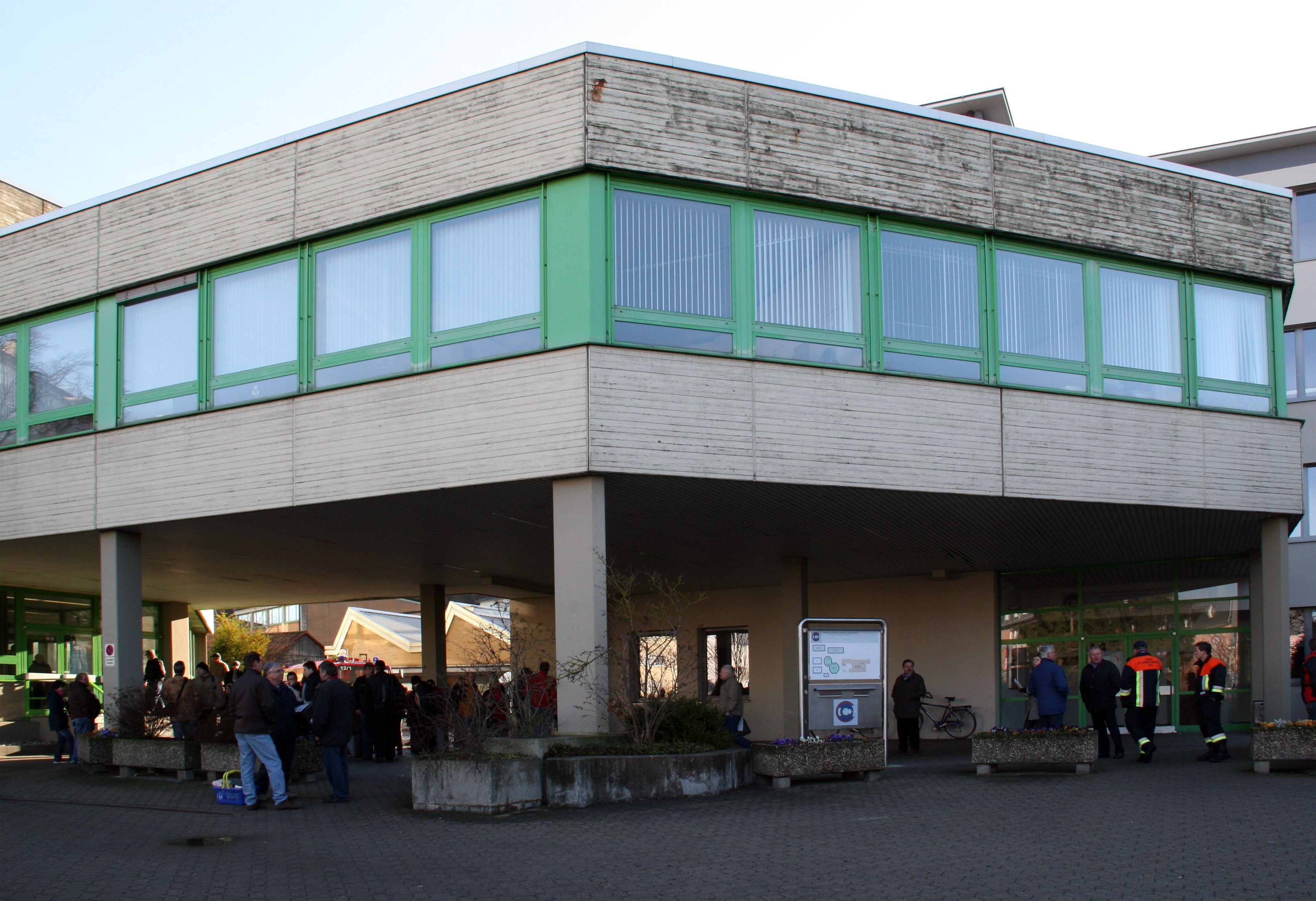 Hilfskrankenhaus Gunzenhausen unterhalb der Berufsschule - hier bei der ersten öffentlichen Führung für die Bevölkerung im November 2009